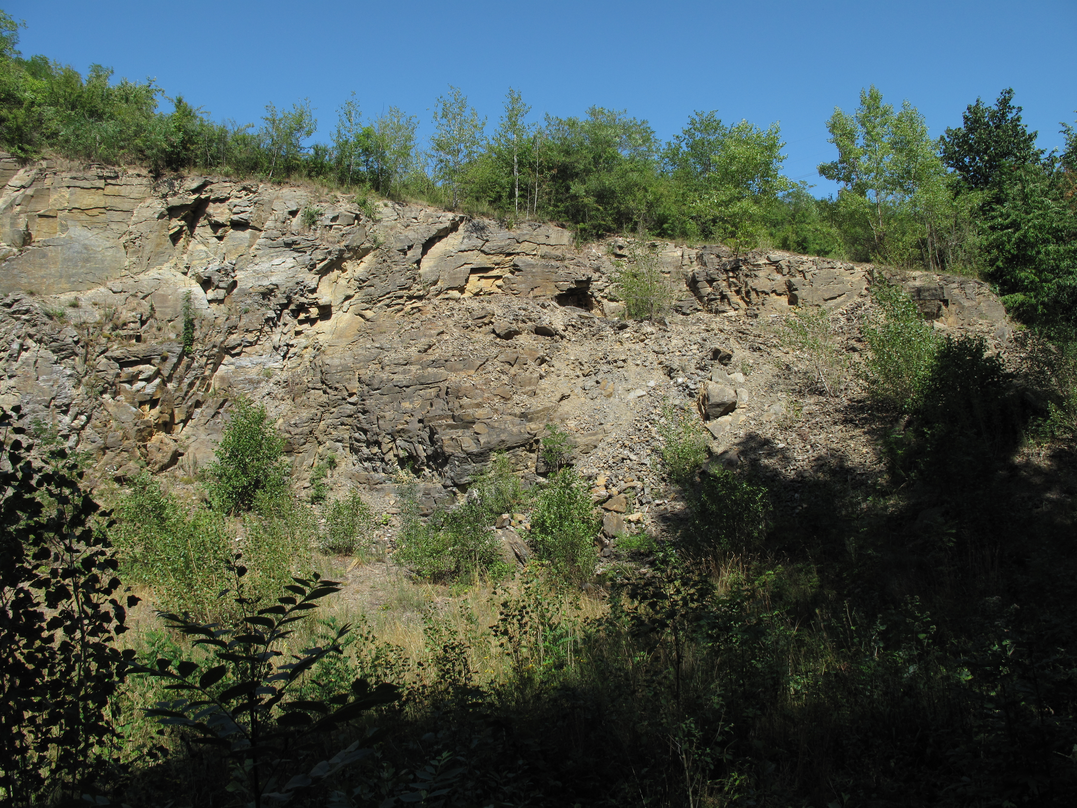 Přírodní památka Pod Šibeničním kopcem. Okres Znojmo, Česká republika.